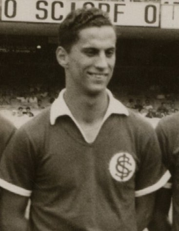 Paulinho, jogador do Internacional.